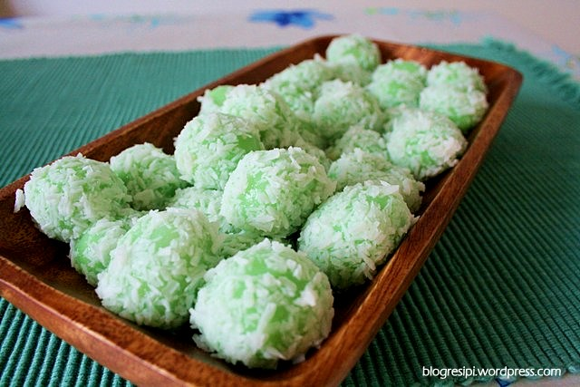 onde2